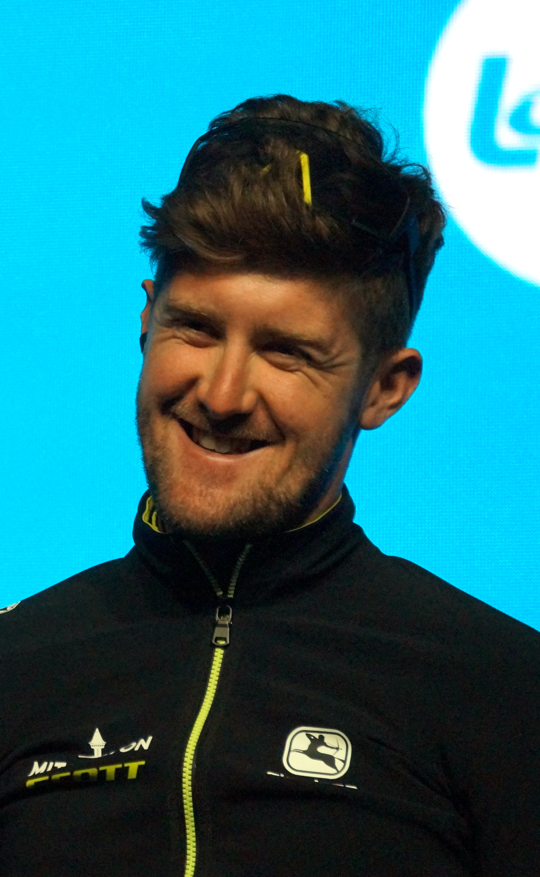 Luke Durbridge bij de ploegenvoorstelling in Gent voor de Omloop Het Nieuwsblad 2020